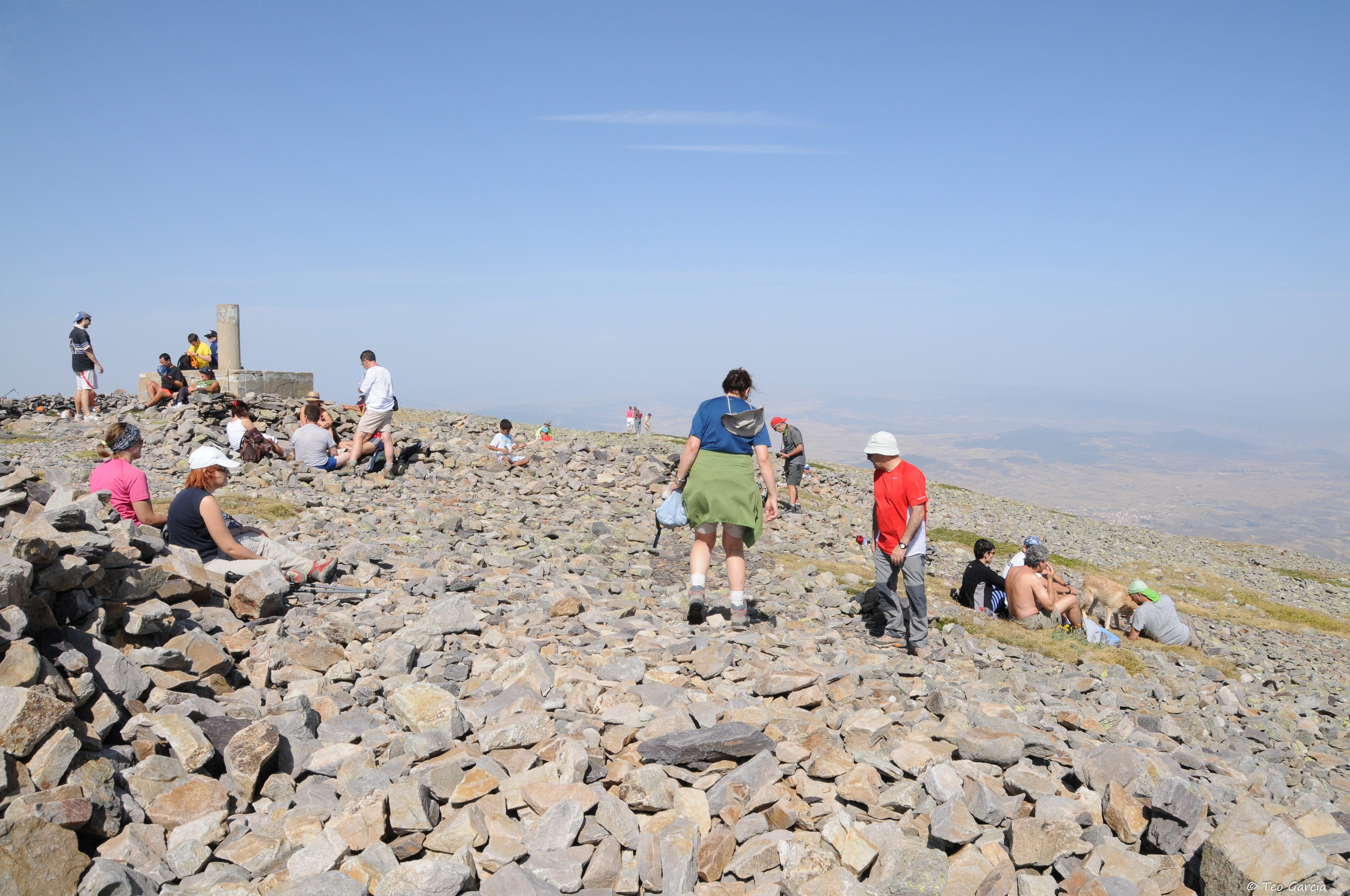 Foto tomada el 20 de agosto de 2011